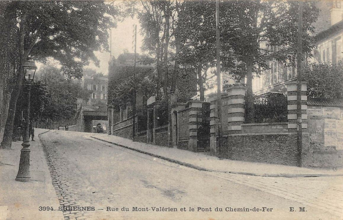 Suresnes.Rue du Mont-Valérien.Pont du Chemin de Fer